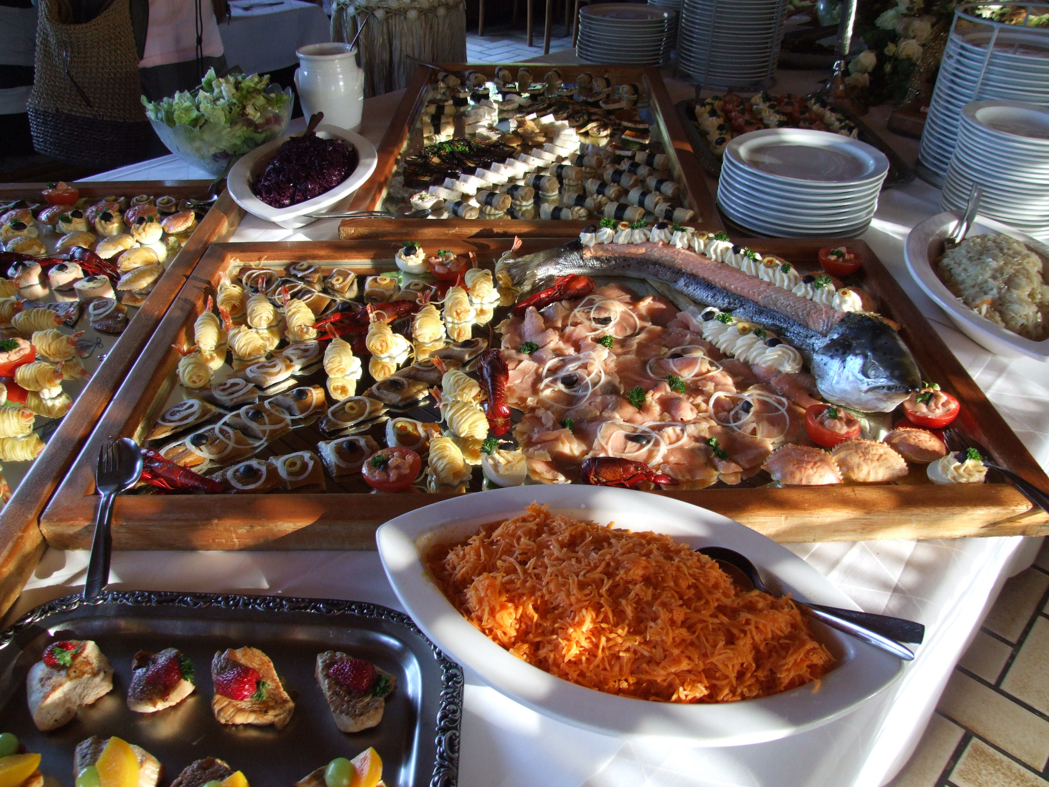 Fischbuffet des deutschen Kochs Torsten Sembries